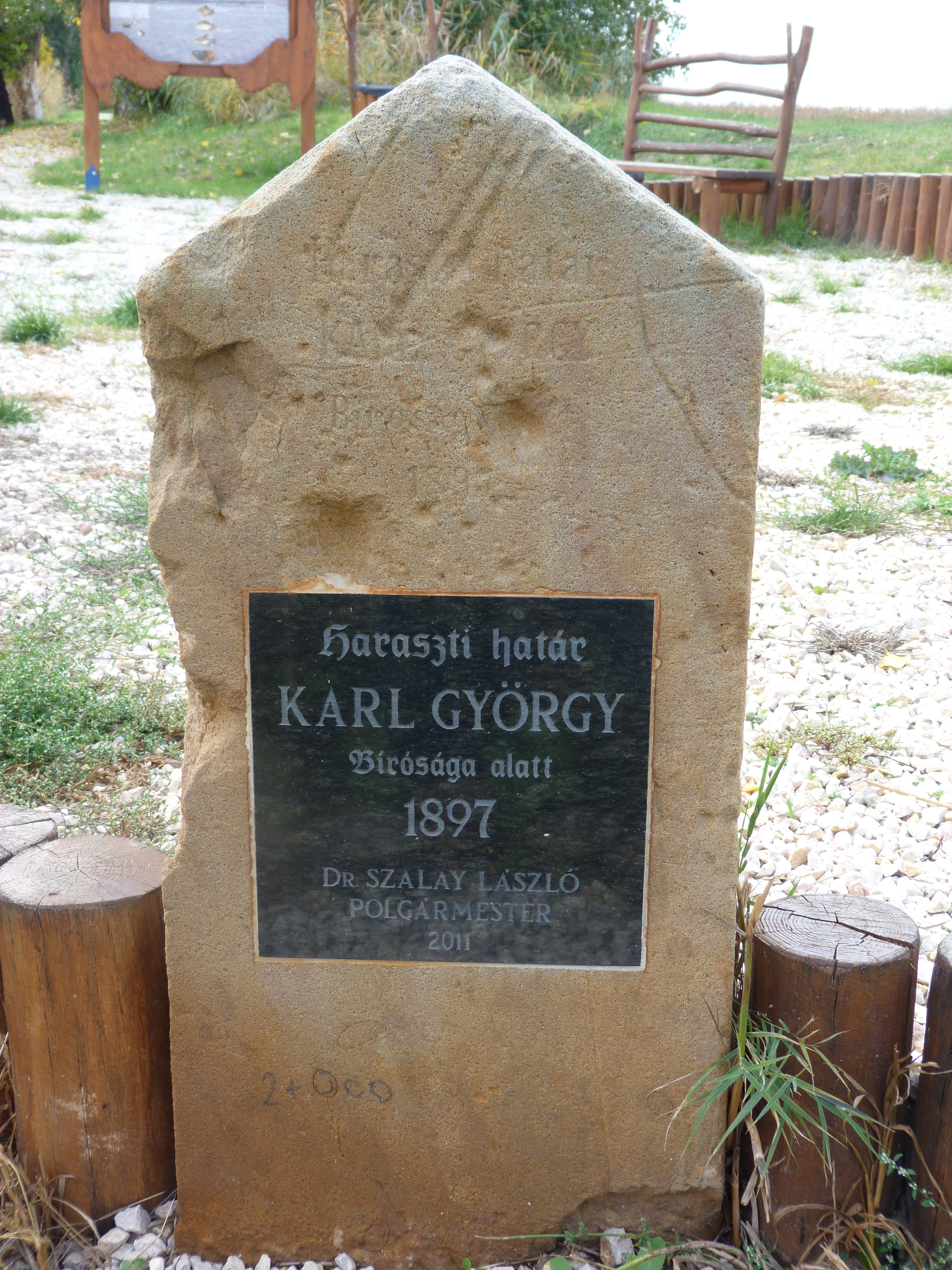 A felvétel 2013. október 14 -én készült Taksonyban. ©© Derzsi Elekes Andor, Budapest, 2013, You are authorised to use these photos and vids under Creative Commons – even for commercial, for profit purposes. Photos must be attributed to Derzsi Elekes Andor. All of the photos and vids in the Metapolisz DVD line are under Creative Commons and can be used even for commercial – for profit – purposes. Recommended Citation Derzsi Elekes Andor: Metapolisz DVD line